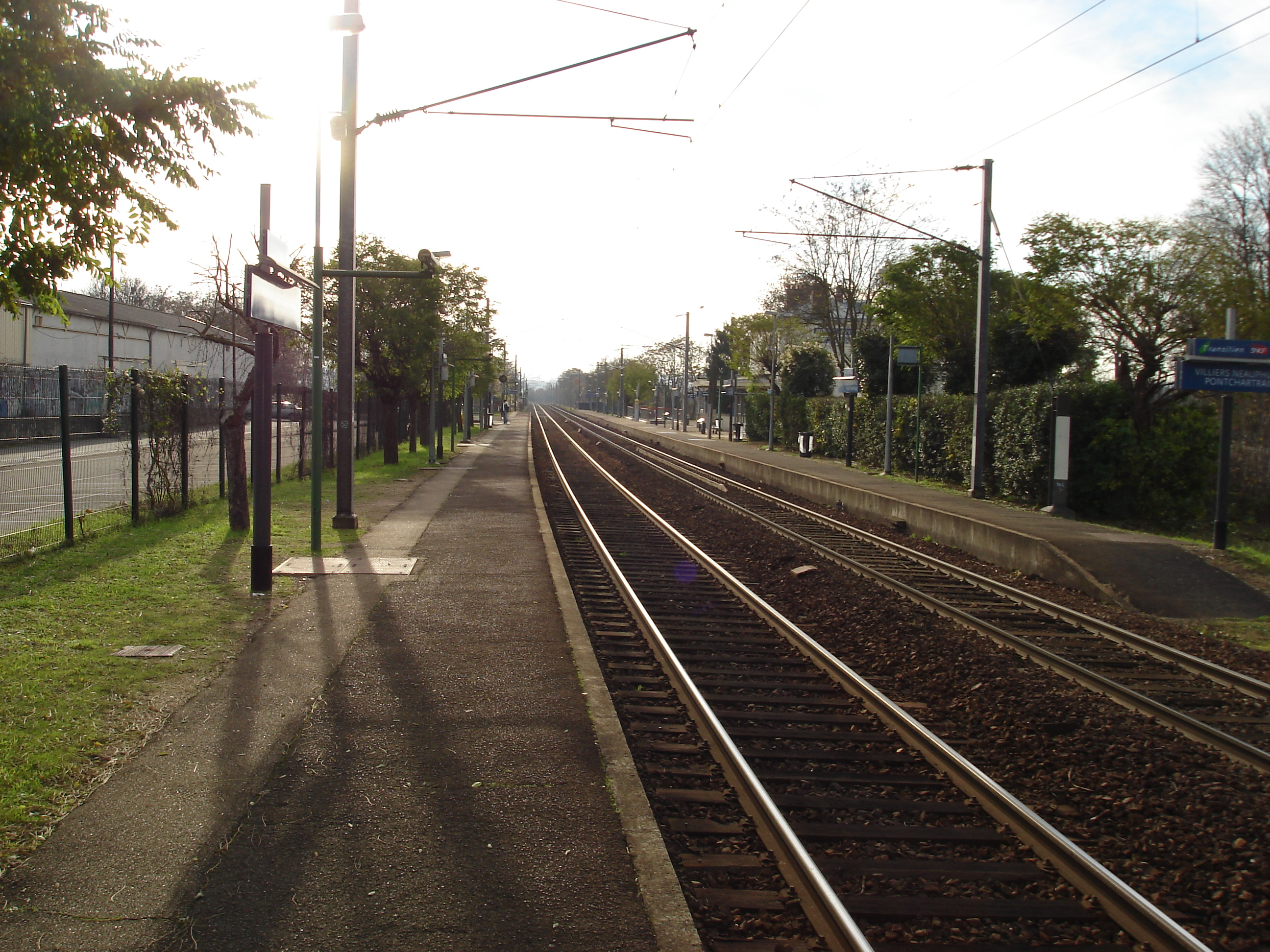 Gare de Villiers - Neauphle - Pontchartrain (78) : Vue générale de la gare.